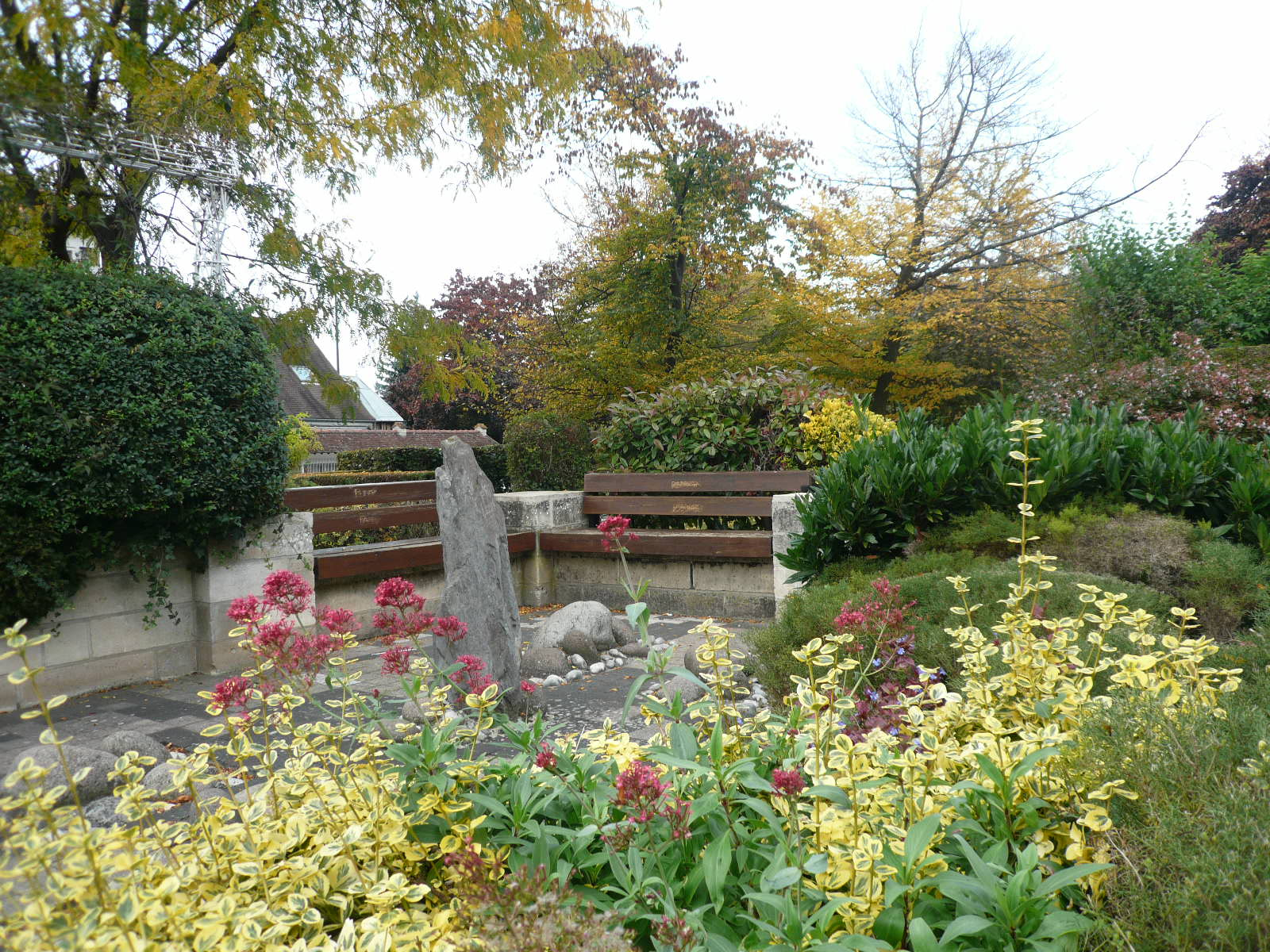 Espace détente face à la mairie de Plaisir